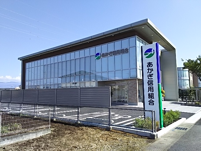 六供町移転後